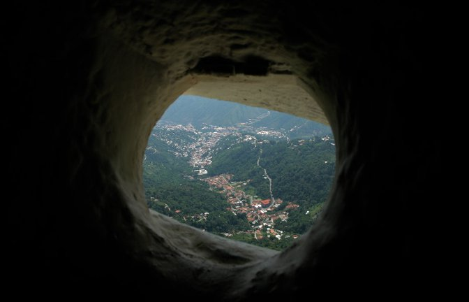 Venezuela